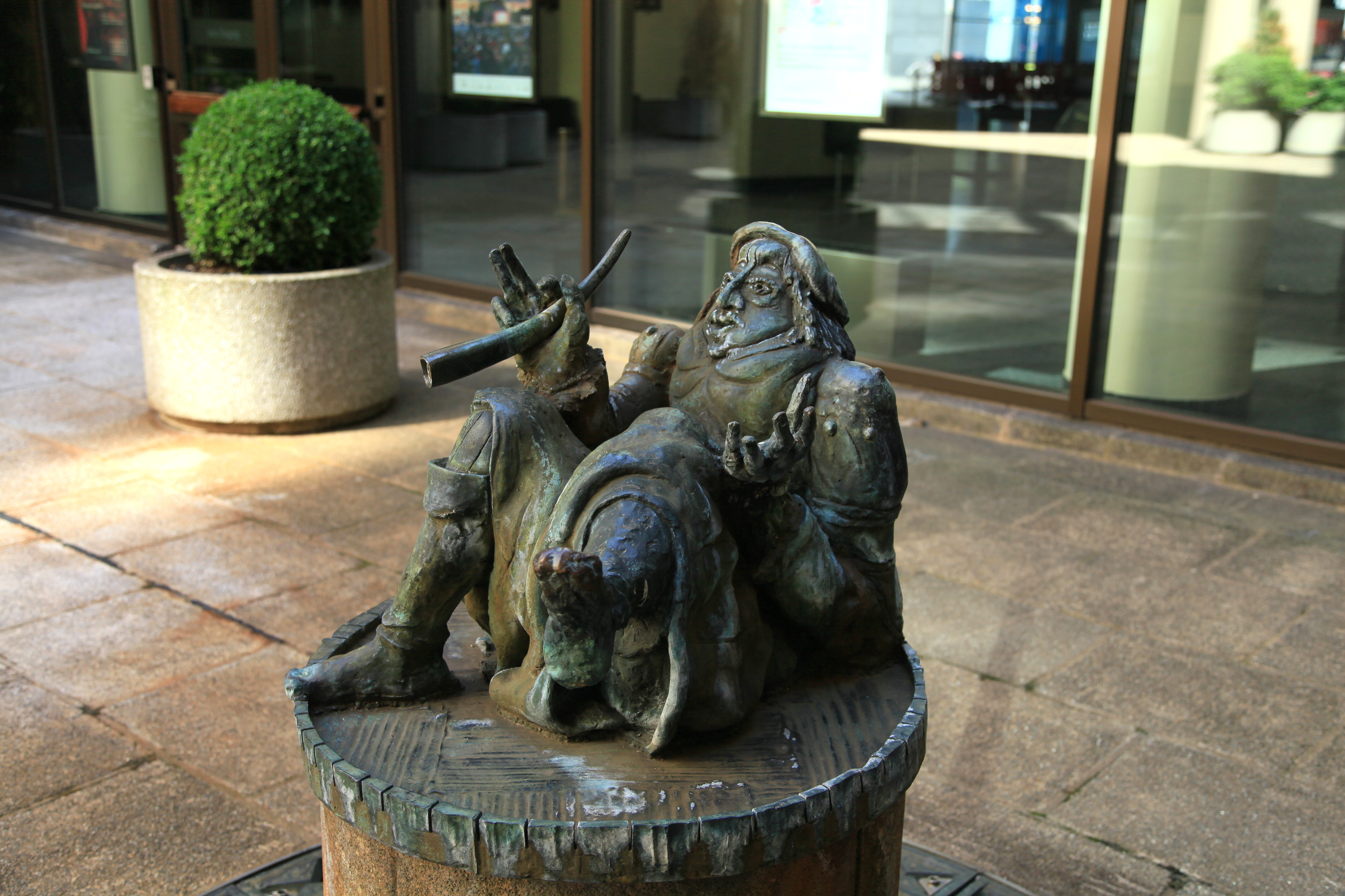 Stadtpfeiferbrunnen, Atrium des Neuen Gewandhauses, Augustusplatz in Leipzig